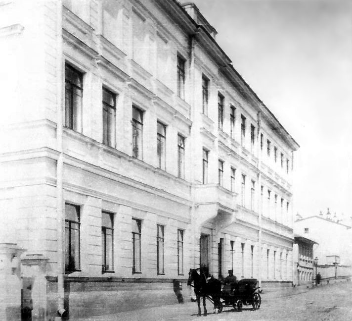 Реальное училище К.К. Мазинга, сегодня московская школа N 57.